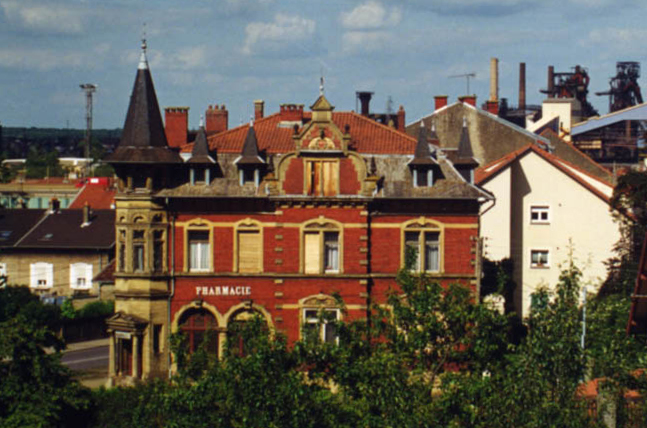 Pharmacie de la rue de Metz (1900), pastiche allemand néo-renaissance, contraste chromatique briques rouges et pierre ocre.